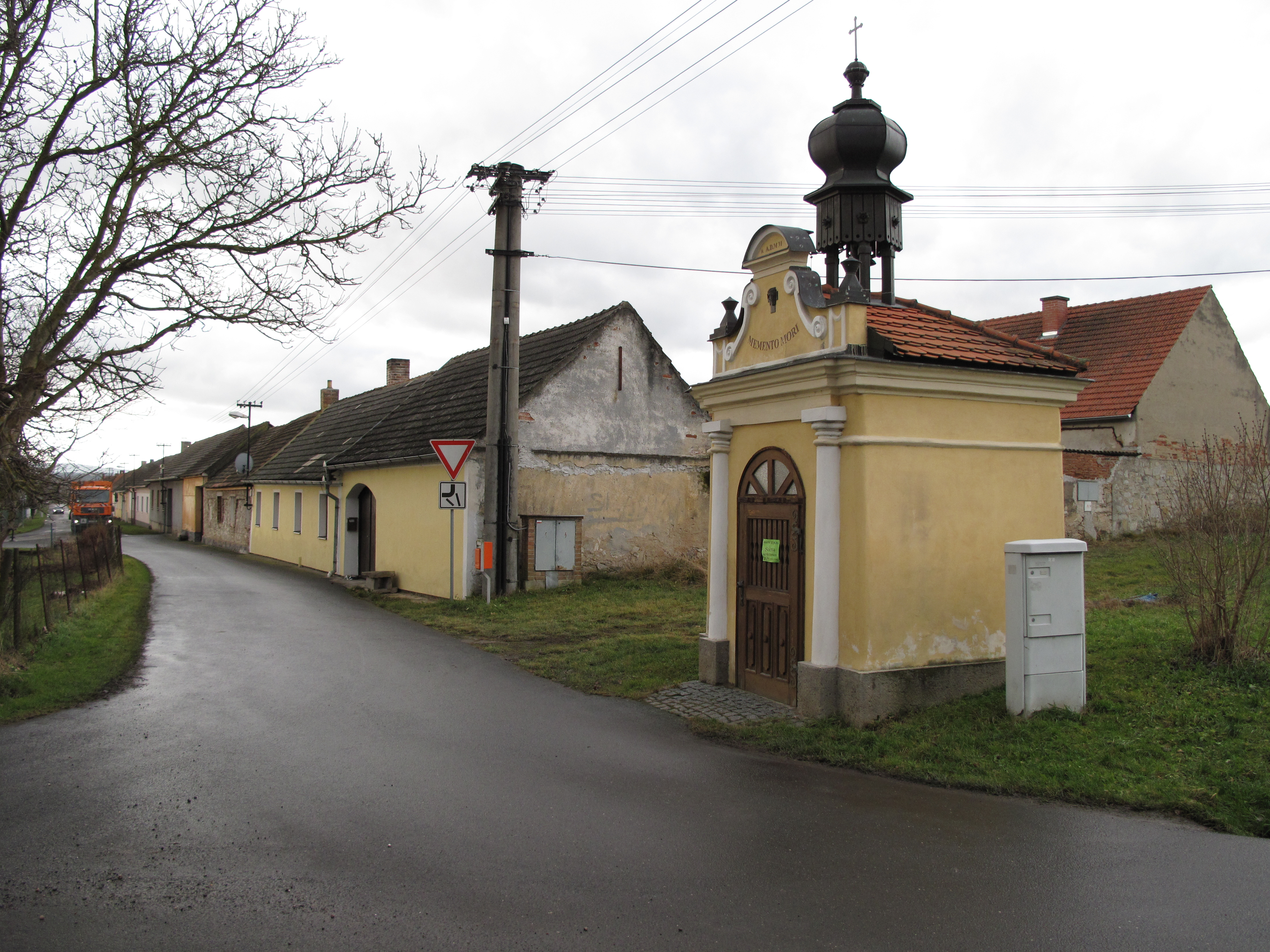 Kaplička v Nových Kestřanech. Okres Strakonice, Česká republika.